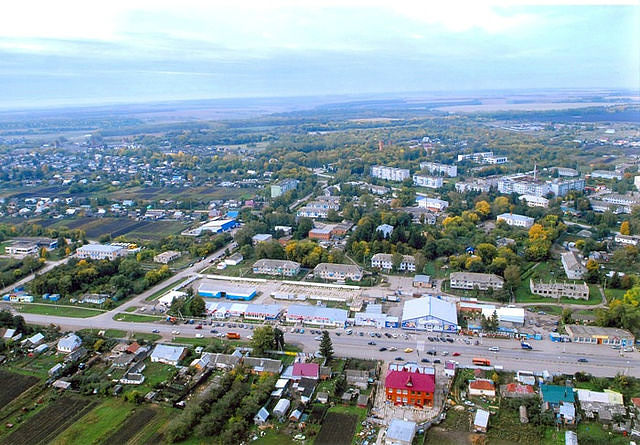 п. Теплое, Тепло-Огаревский р-н, Тульской обл.